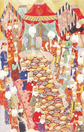 Lala Mustafa Paşa ve Kılıç Ali Paşa